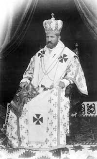 Миторополит Андрій Шептицький, Ukrainian Greek Catholic Church leader, metropolitan